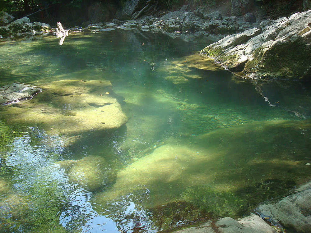 Голубое озер в Каньоне